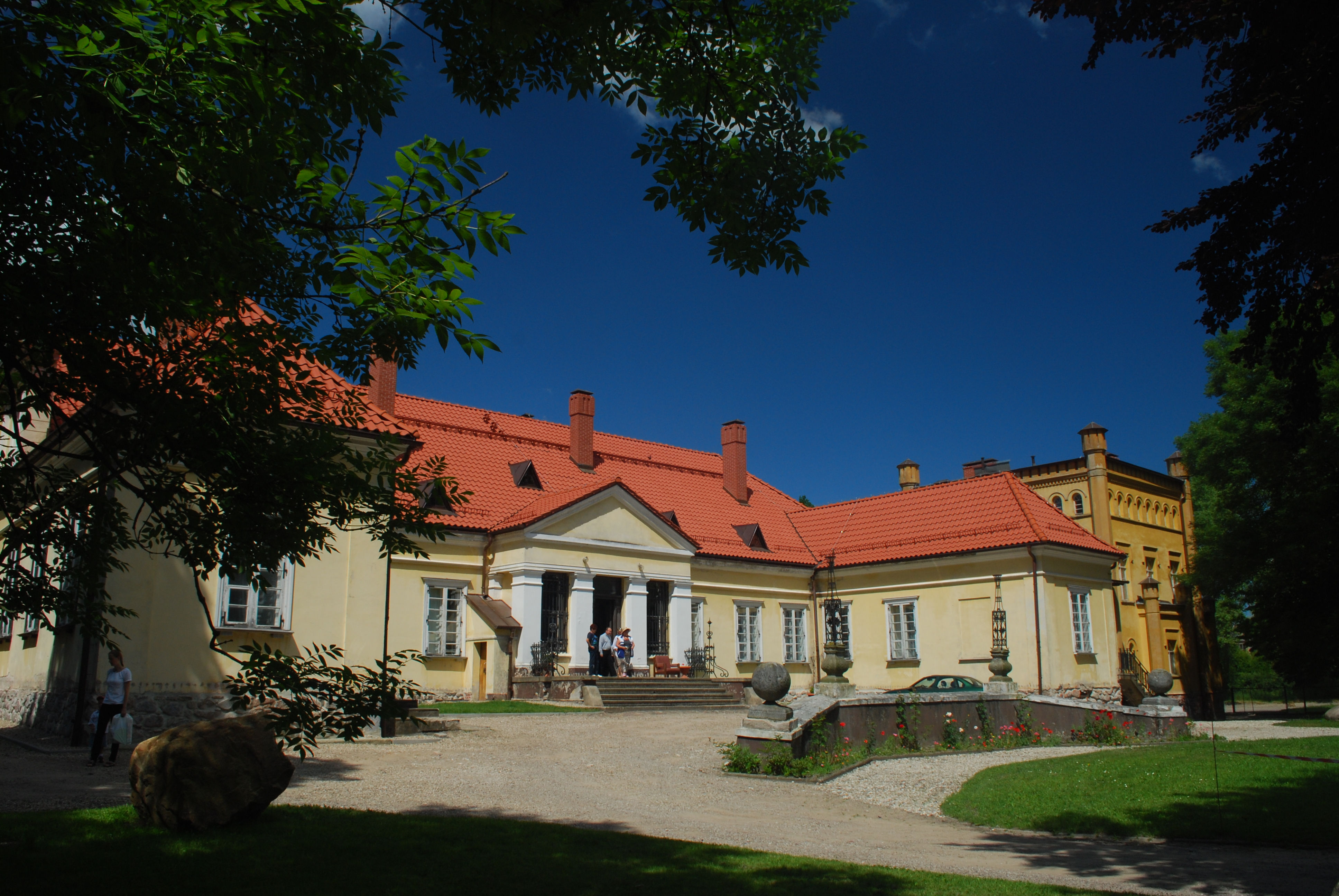 Pałac w Waplewie Wielkim od frontu.